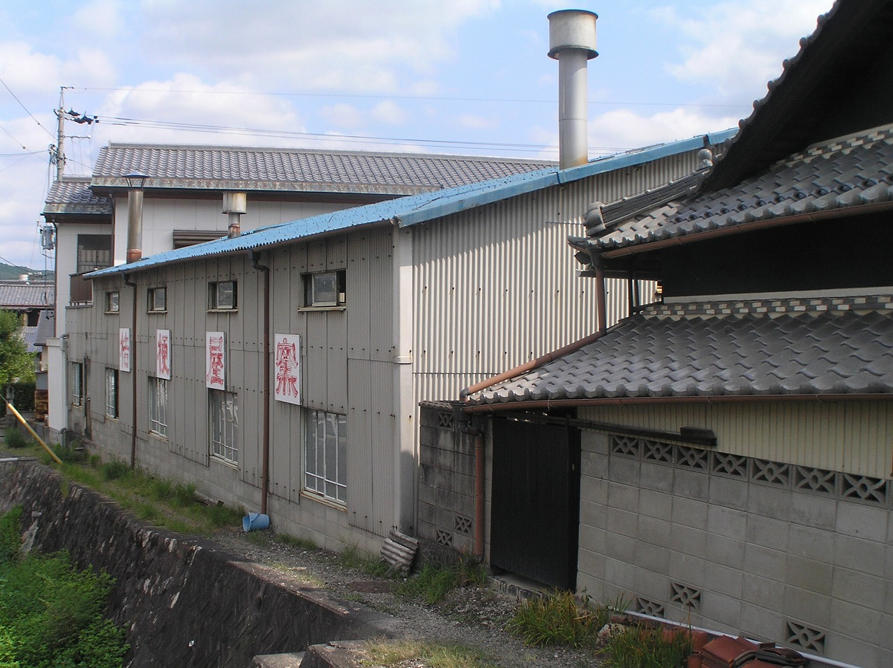 kikyouyakama-sinoyaki8139453 桔梗屋窯 有限会社 金小桑原製陶所. 〒509-5121 岐阜県土岐市土岐津町高山371. TEL:0572-55-2579 FAX:0572-55-0364 ...